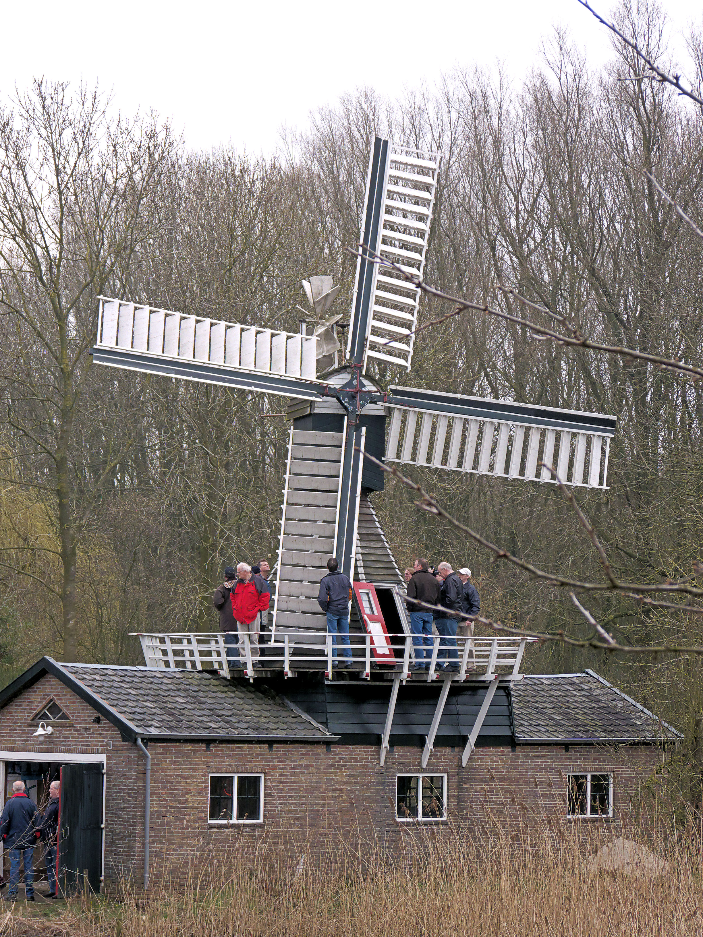 Spinnenkopmolen Wedderveer met open kleppen